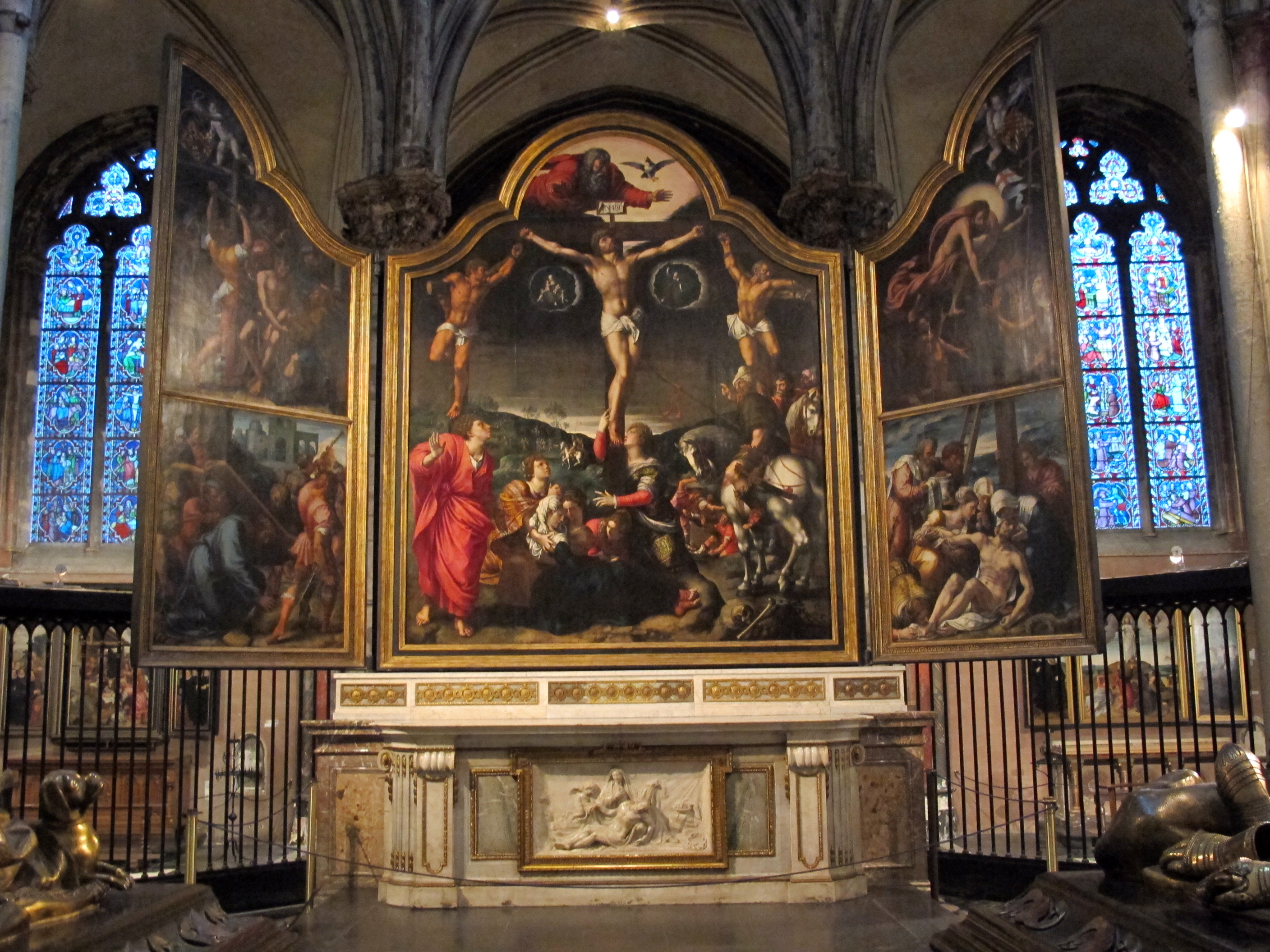 Chiesa di nostra signora, bruges, int., altare di bernard van orley